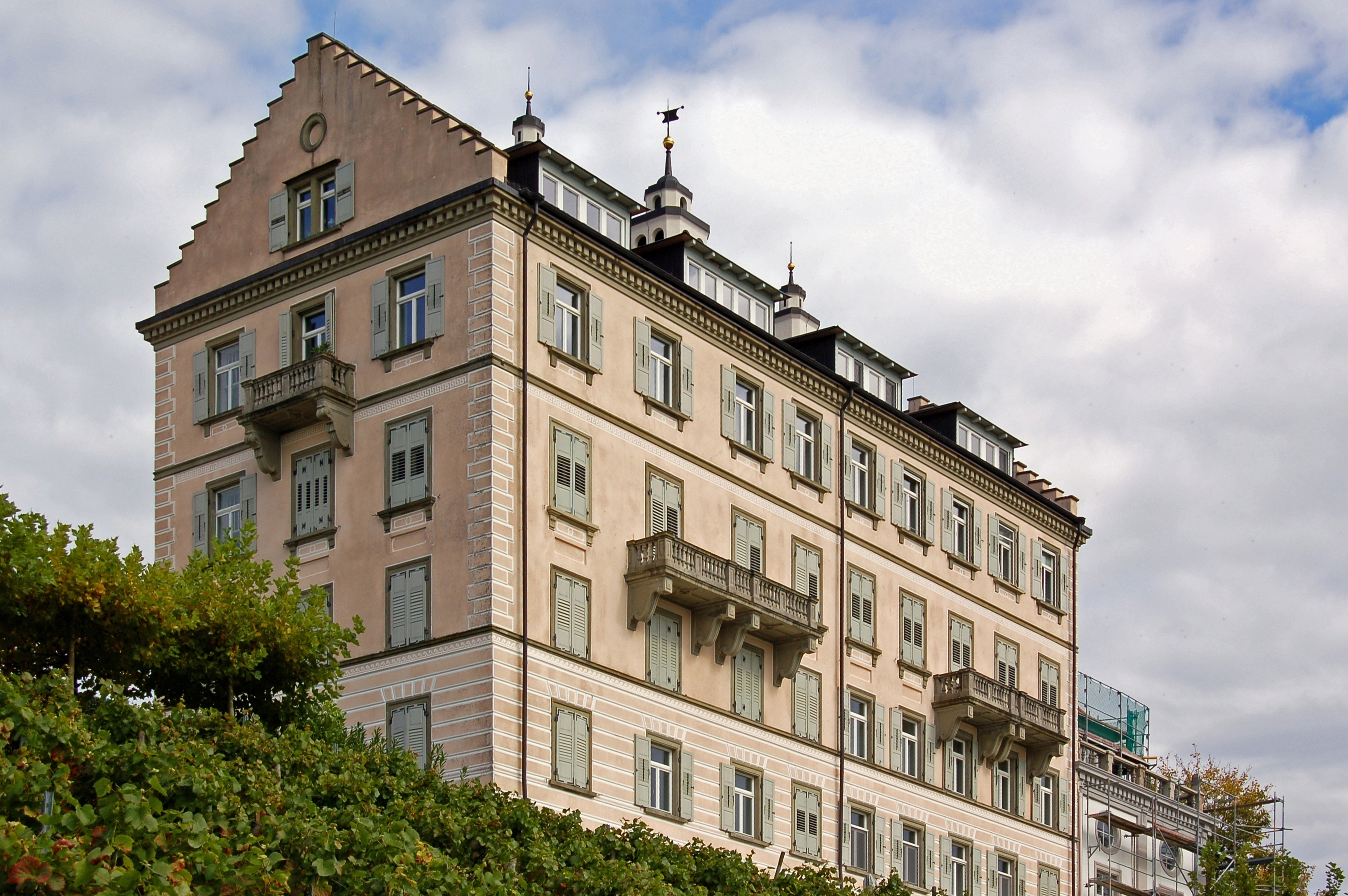 Das ehem. Schloss Kirchberg liegt zwischen Hagnau und Immenstaad am Bodensee, wird zur Zeit renoviert (2007) und zur Eigentumswohnanlage umgebaut. Liegt mitten in den Weinbergen und bietet einen tollen Blick auf den Bodensee. Hier führt auch der Bodensee-Radwanderweg vorbei.